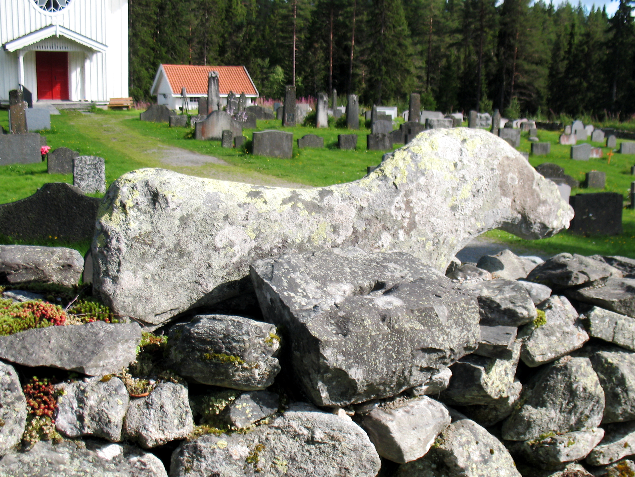 Steinmerra ved Skafså kyrkje i Tokke kommune, Telemark.